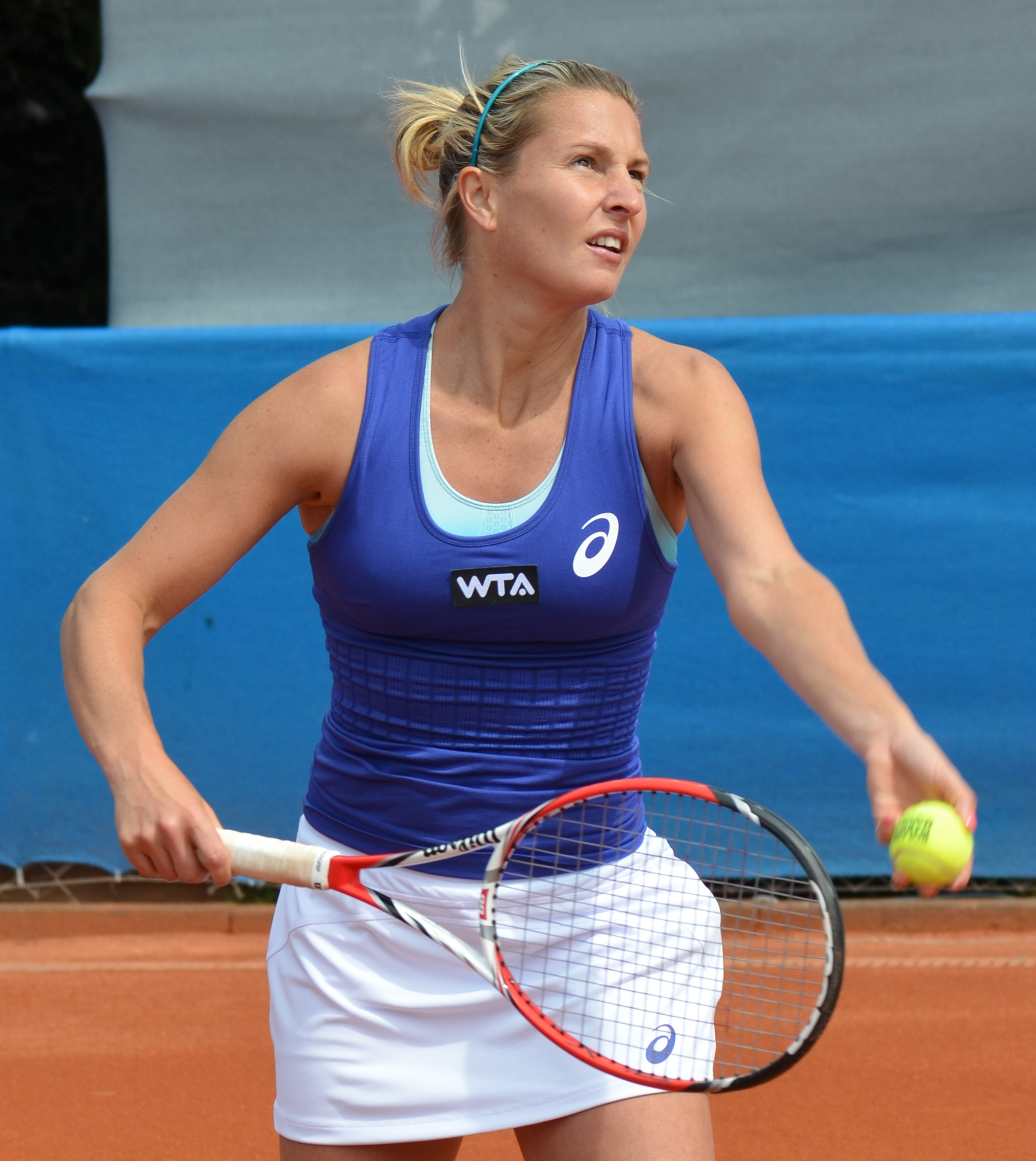 Maria Elena Camerin bei der Erstrundenbegegnung der Qualifikation des Nürnberger Versicherungscup 2014 gegen Julia Glushko